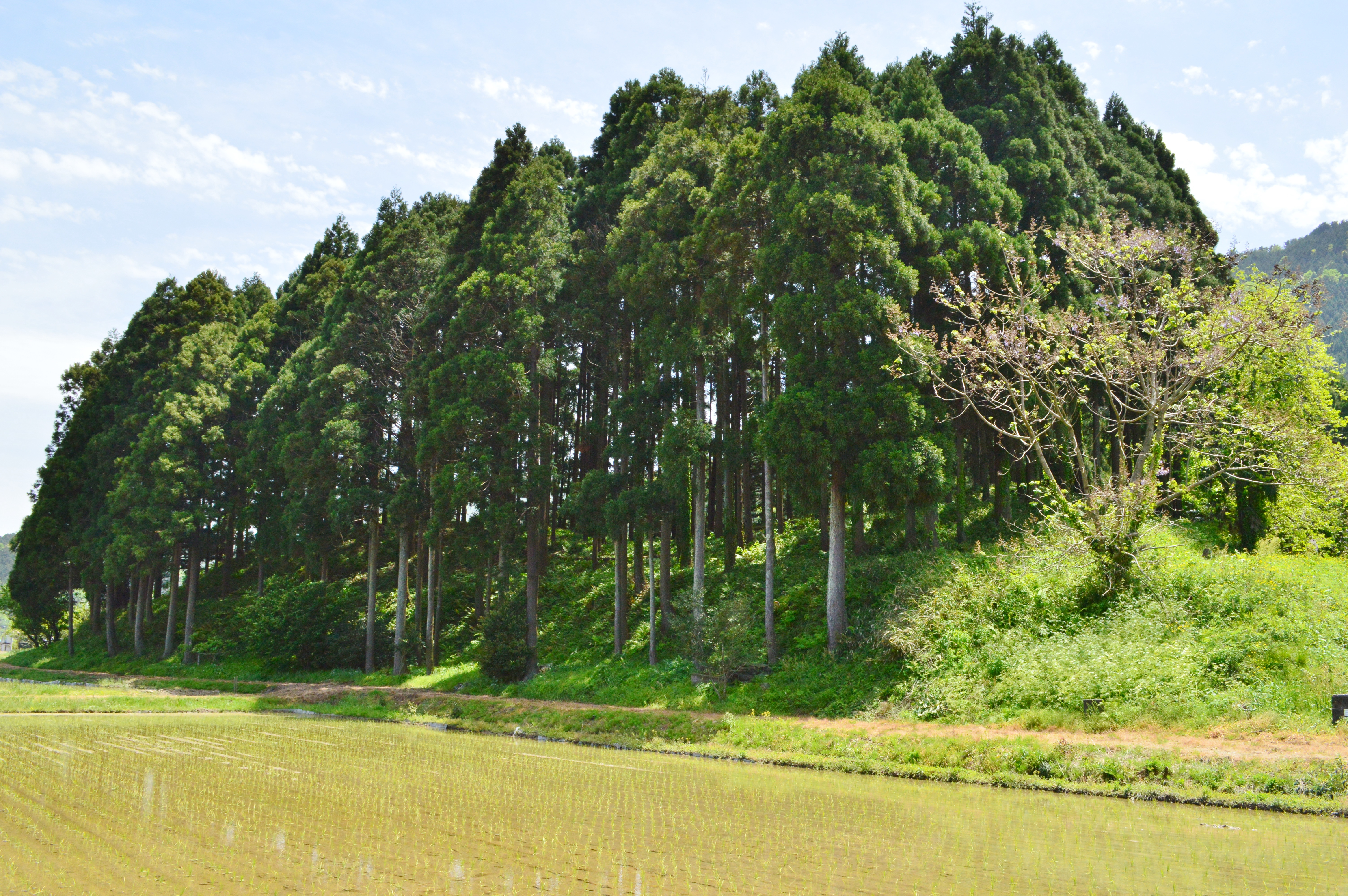 下船塚古墳 墳丘全景